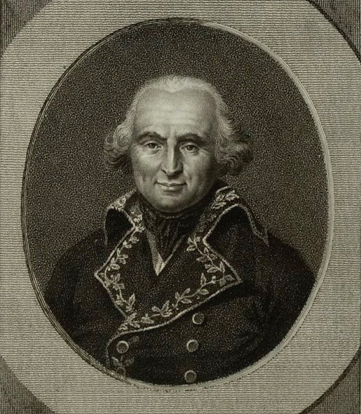 Estampe de Pierre Marie Barthélemy Ferino, Musée de la Révolution française, Vizille